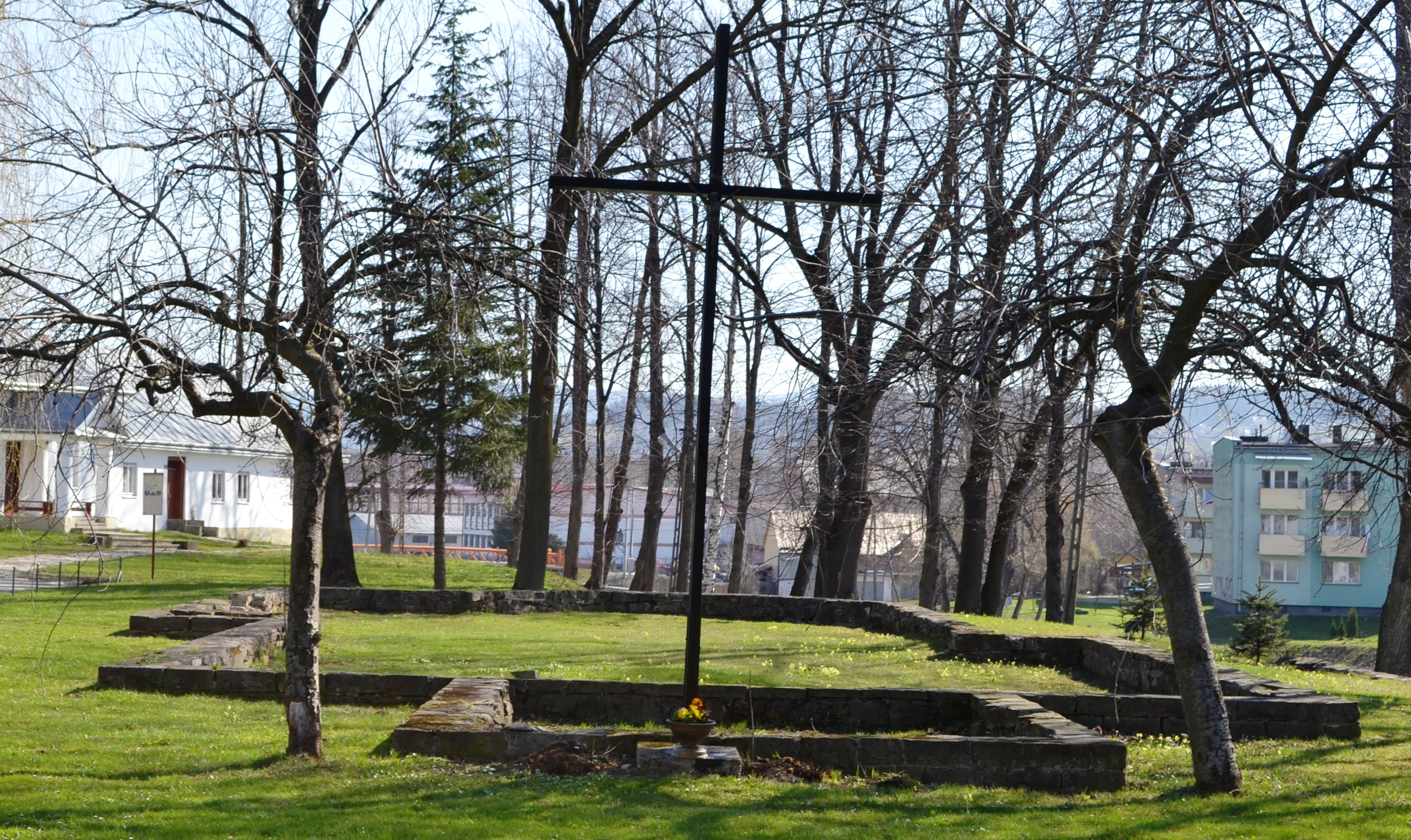 Fundamenty pozostałe po rozebranym kościele św. Bernardyna w Grybowie